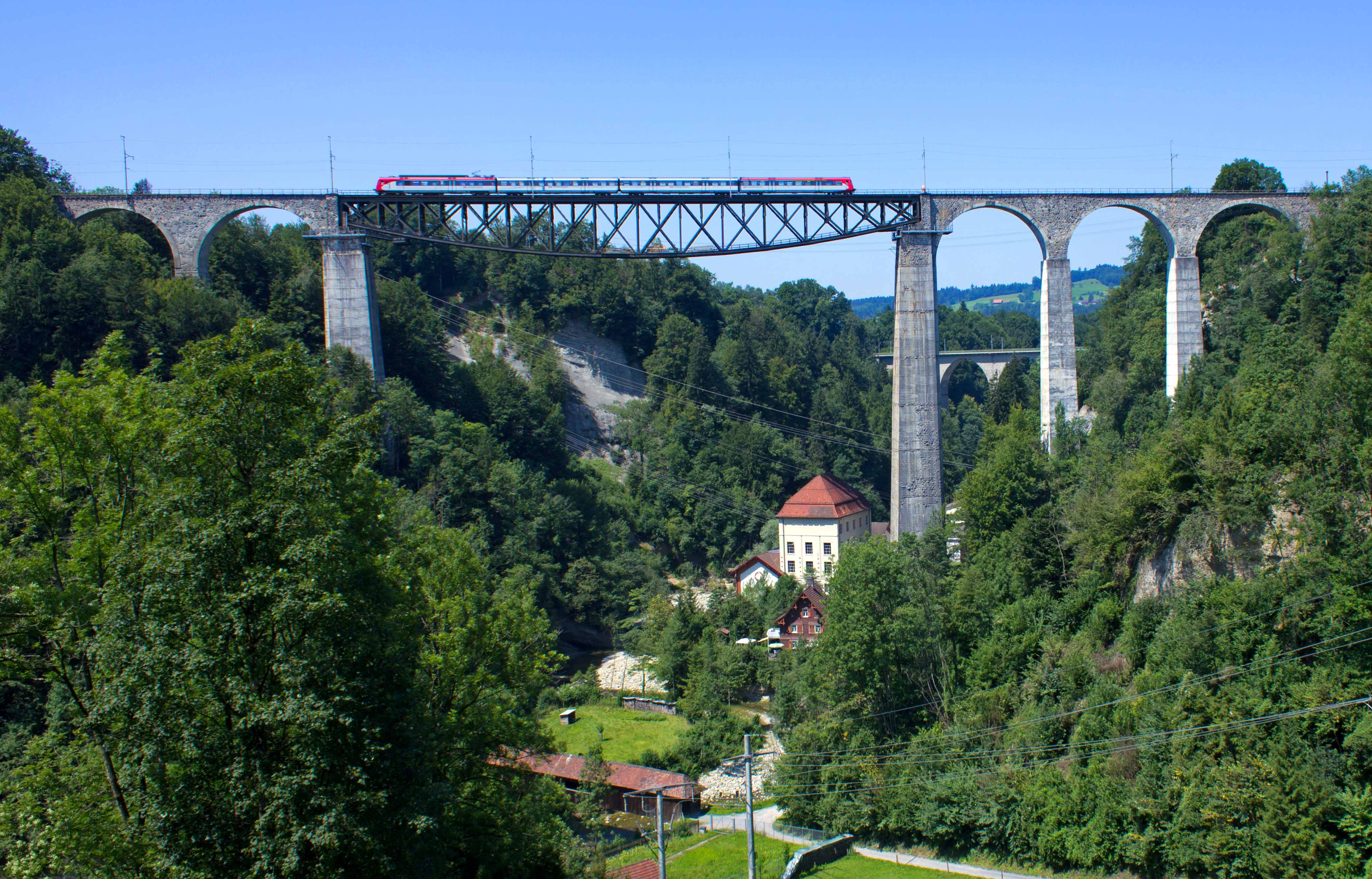 Eisenbahnbrücke Bodensee-Toggenburgbahn St. Gallen - 2012